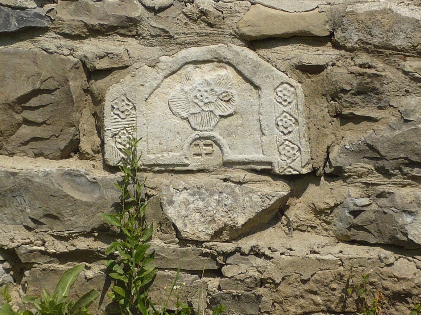 Tablica na murze wokół kościoła ormiańskiego pw. Niepokalanego poczęcia NMP